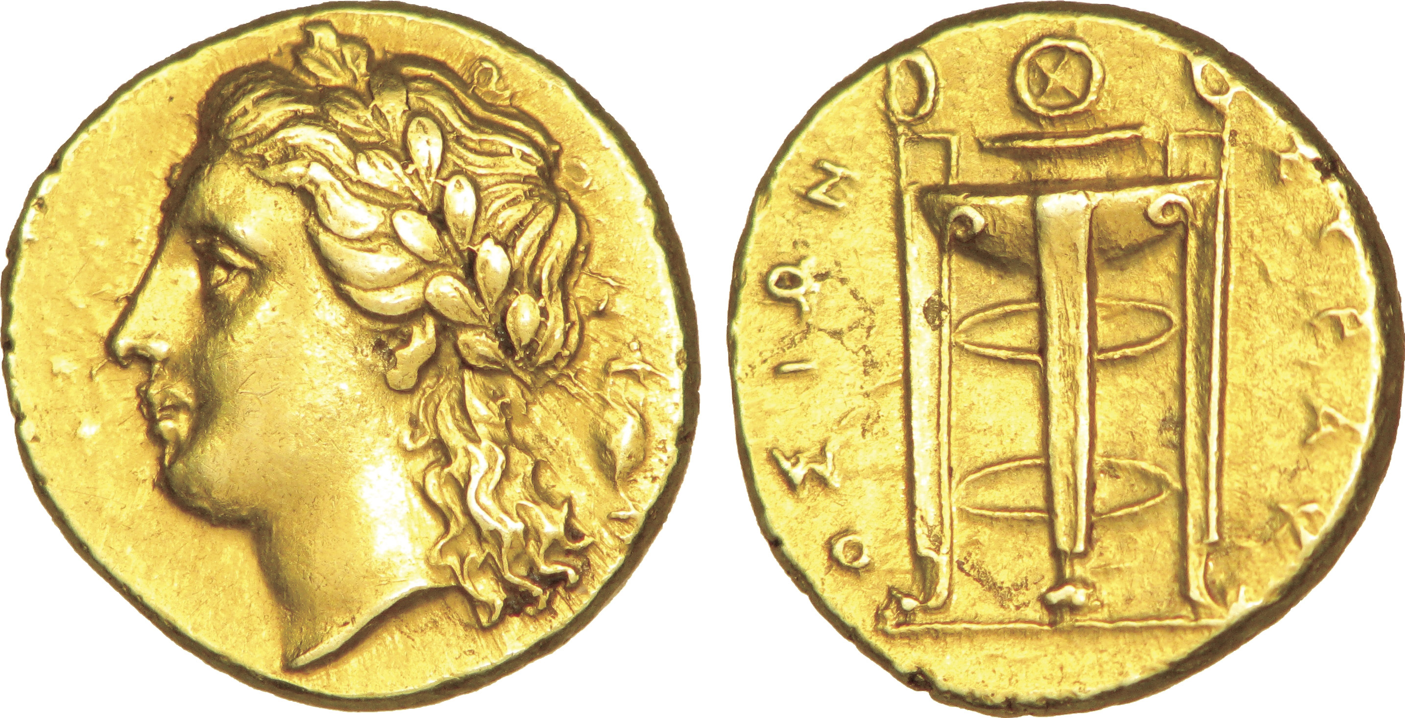 Nom de l'atelier : Sicile, Syracuse Métal : électrum Diamètre : 15,5mm Axe des coins : 8h. Poids : 3,62g Titulature avers : Anépigraphe. Description avers : Tête laurée d'Apollon à gauche, les cheveux longs ; derrière la tête, une amphore. Description revers : Trépied delphien. Légende revers : SURAK-OSIWN Traduction revers : (de Syracuse).